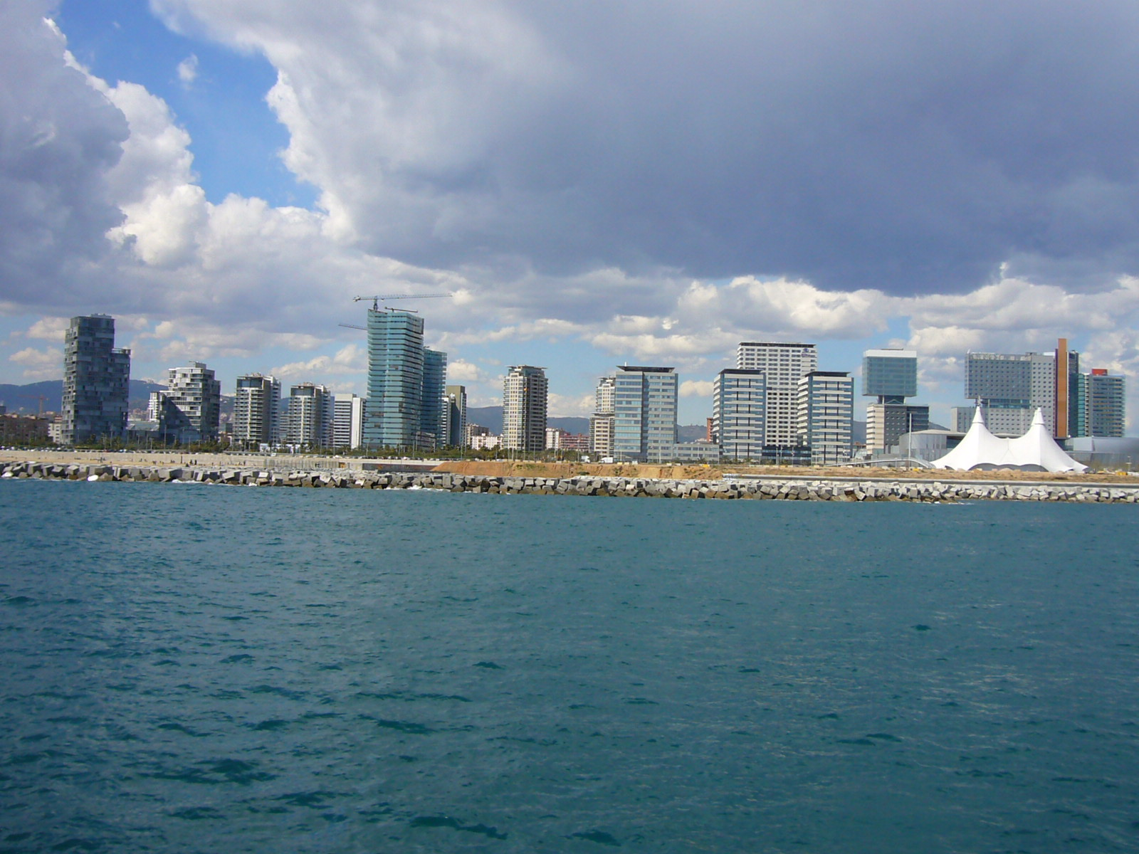 diagonal Mar